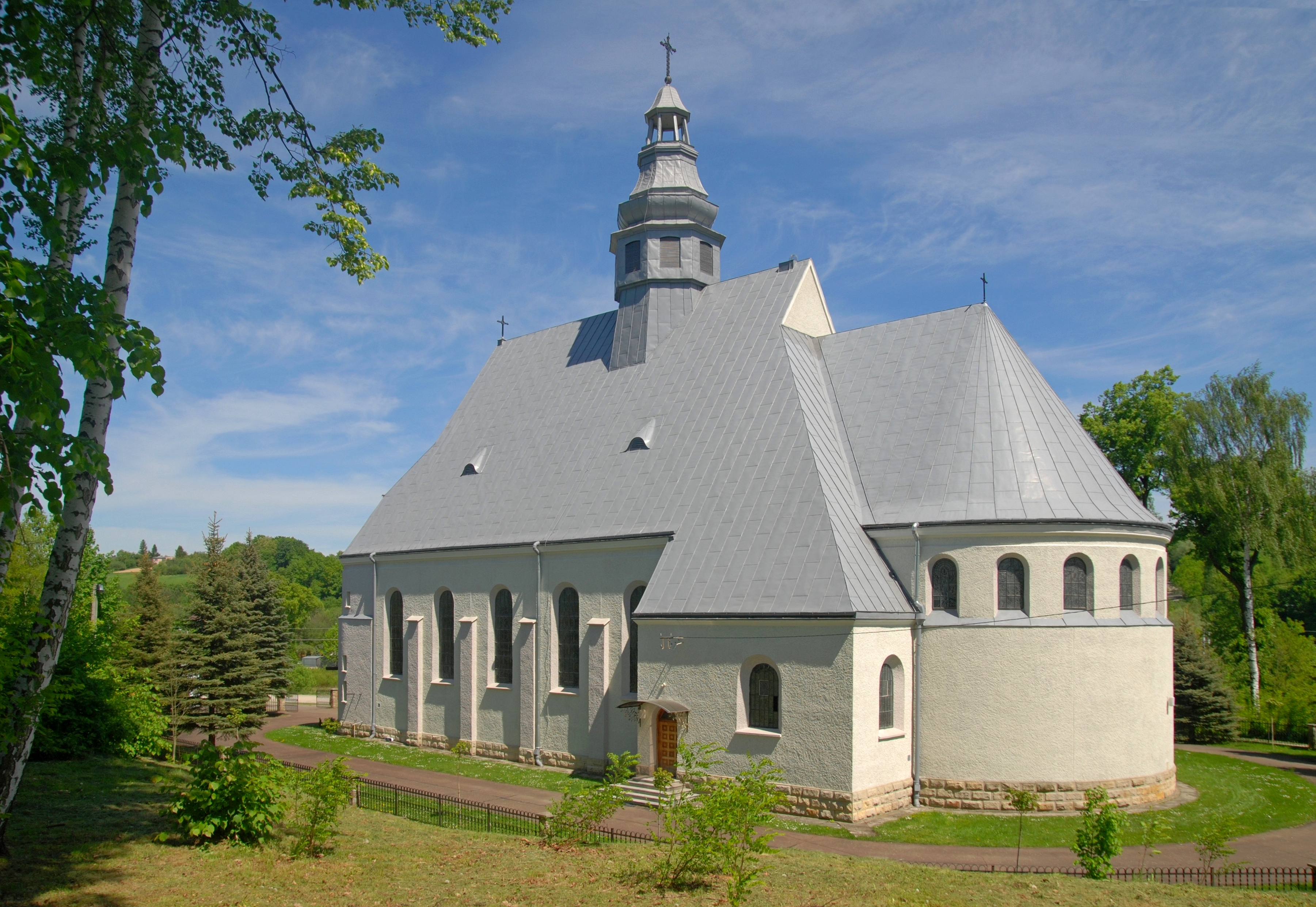 wieś Bączal Dolny